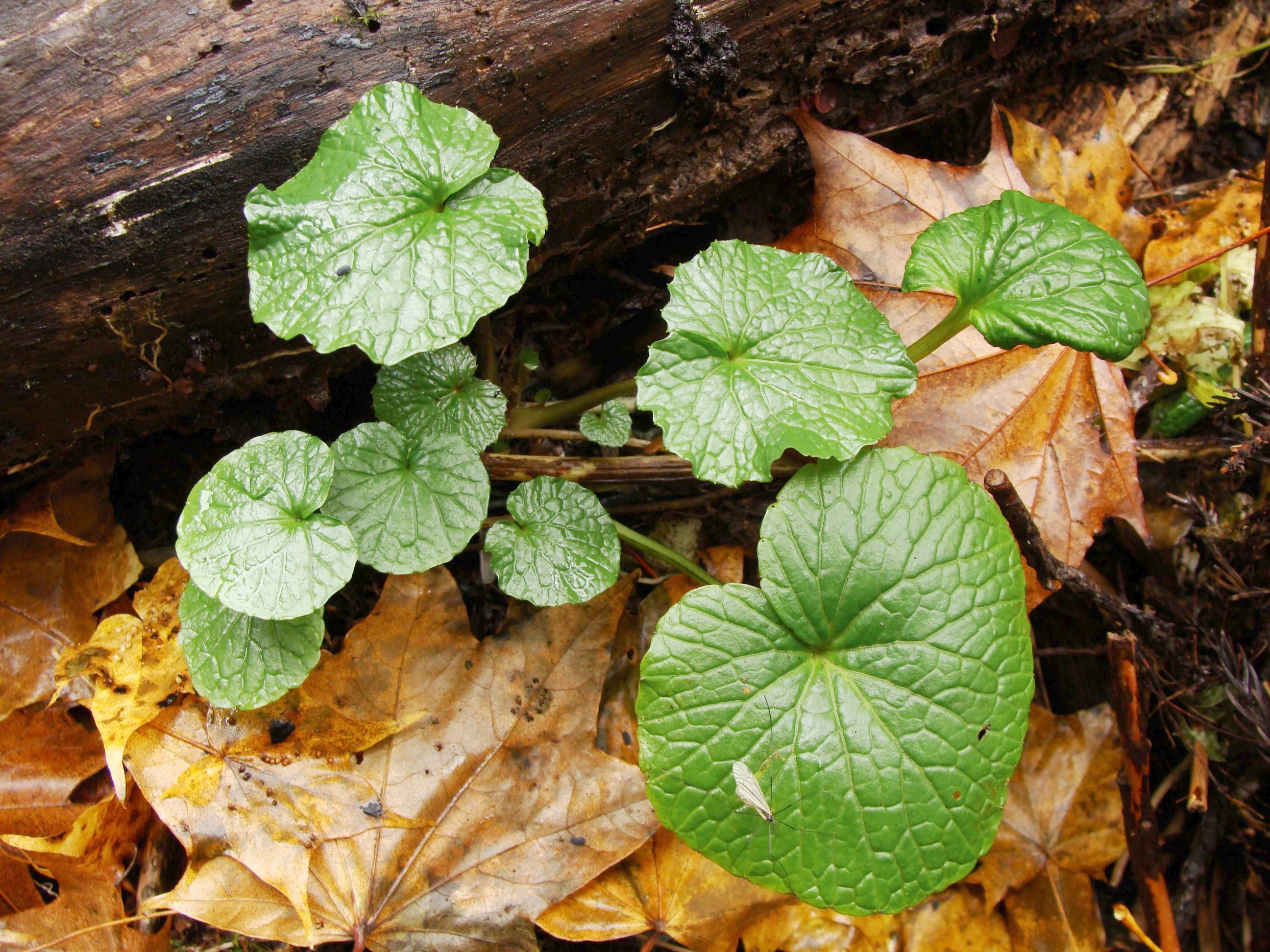 Brassicaceae_Eutrema_Wasabi, syn.: Wasabia japonica (Akita. Japan)